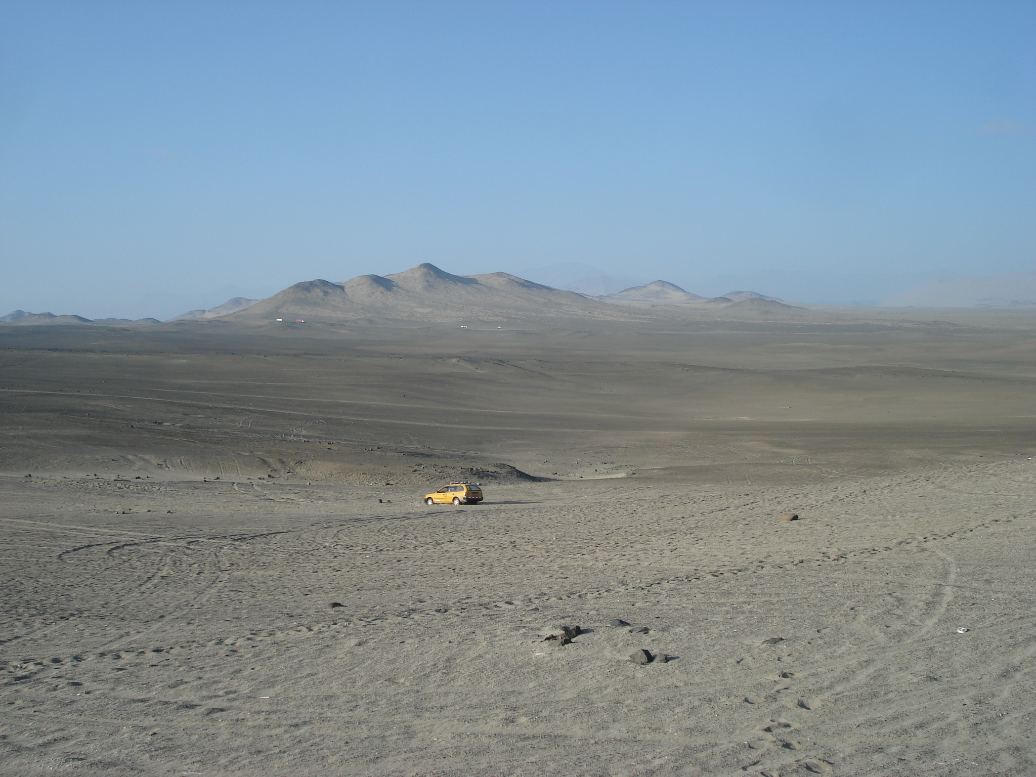 Las Aldas o las Haldas.